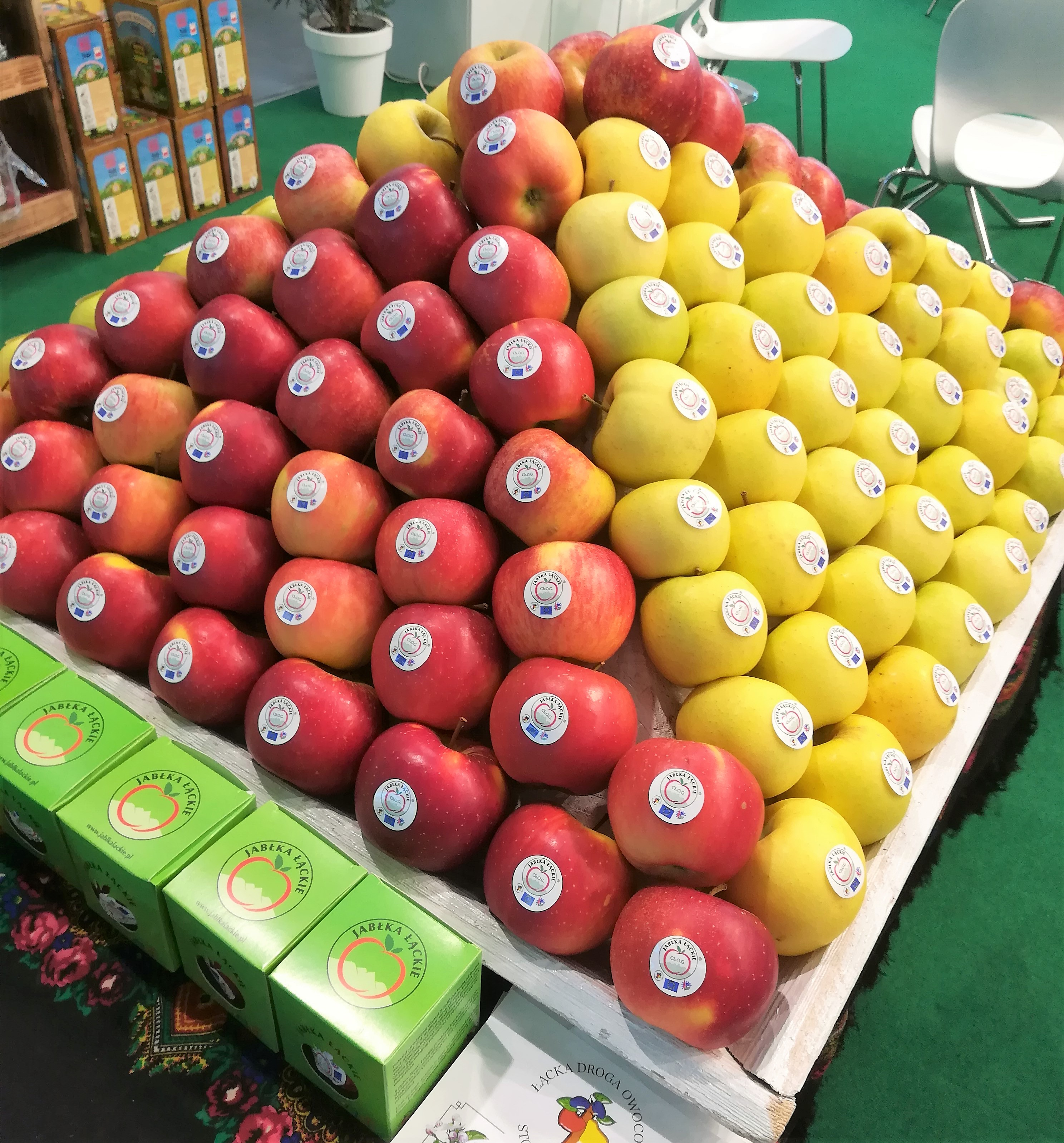 Targi Smaki Regionów w Poznaniu - 2018r.